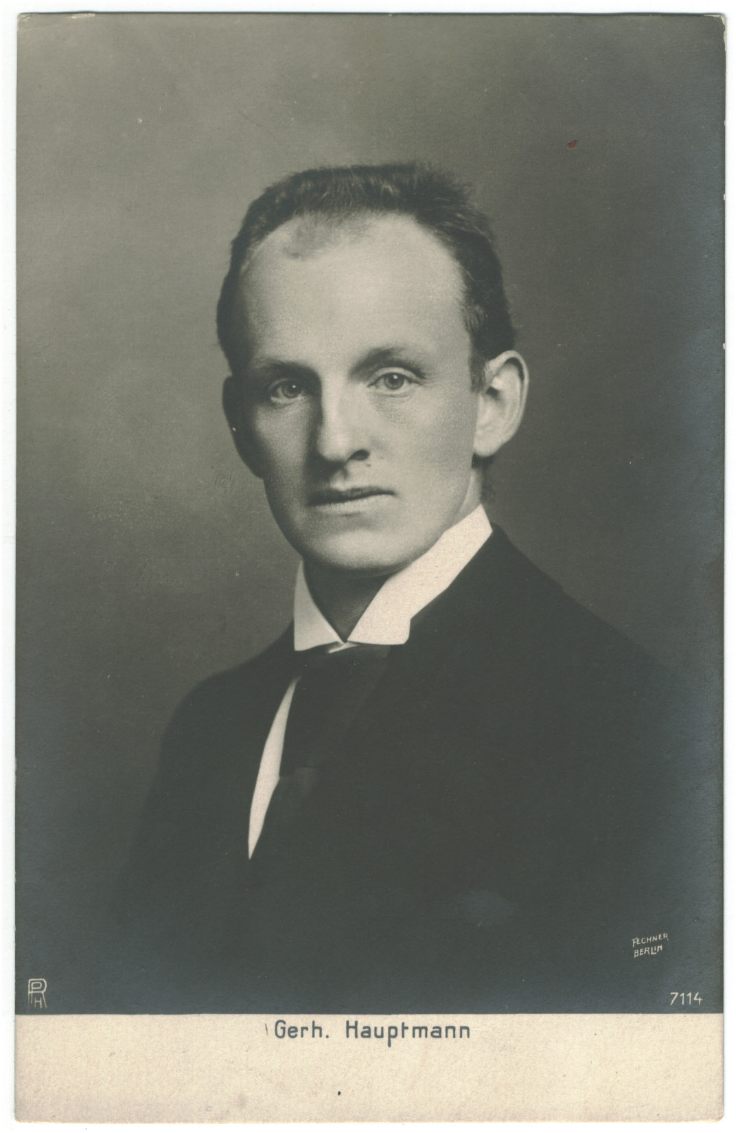 Gerhart Hauptmann (1862-1946), German writer